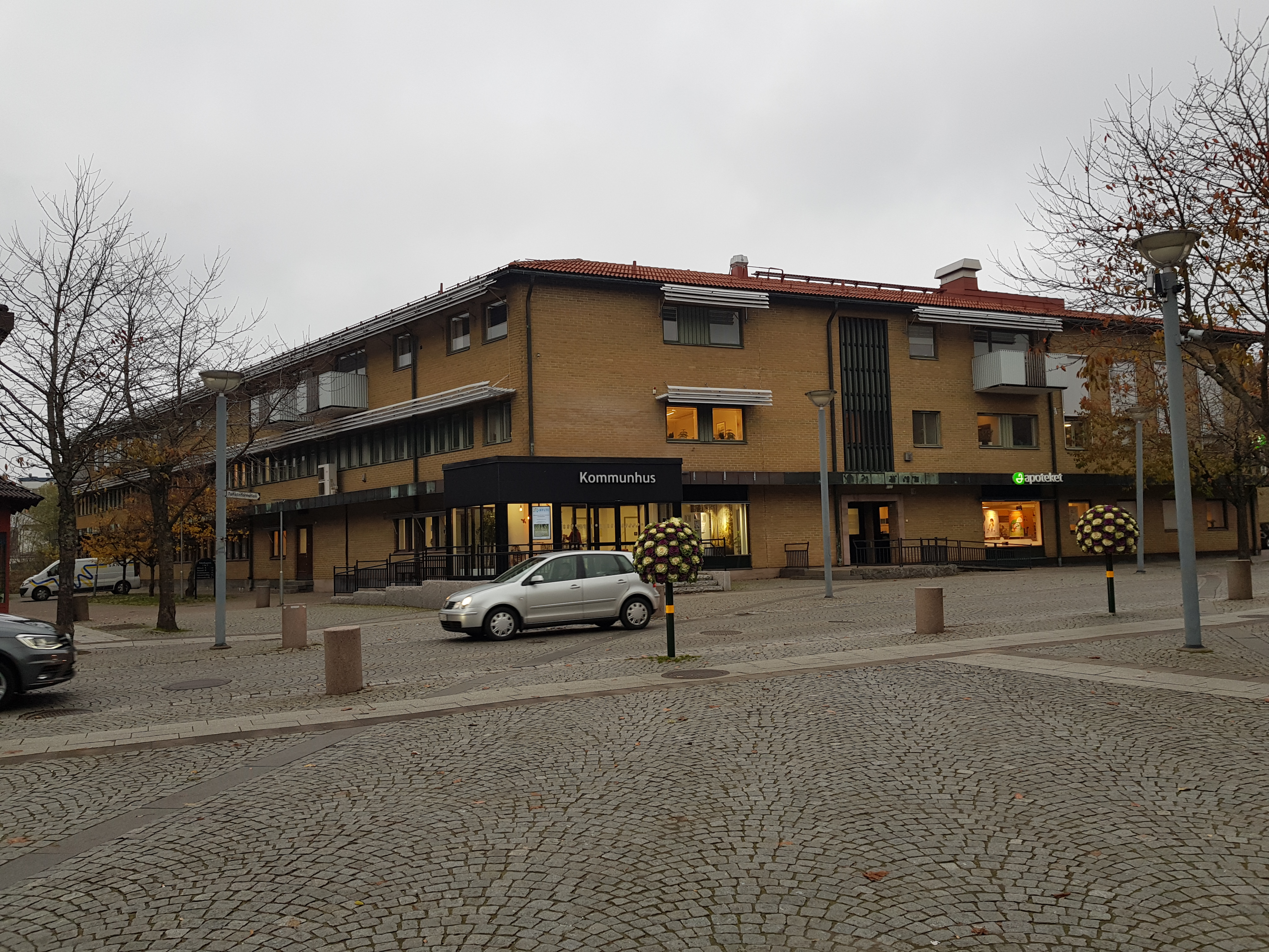 Kommunhuset i Hyltebruk.